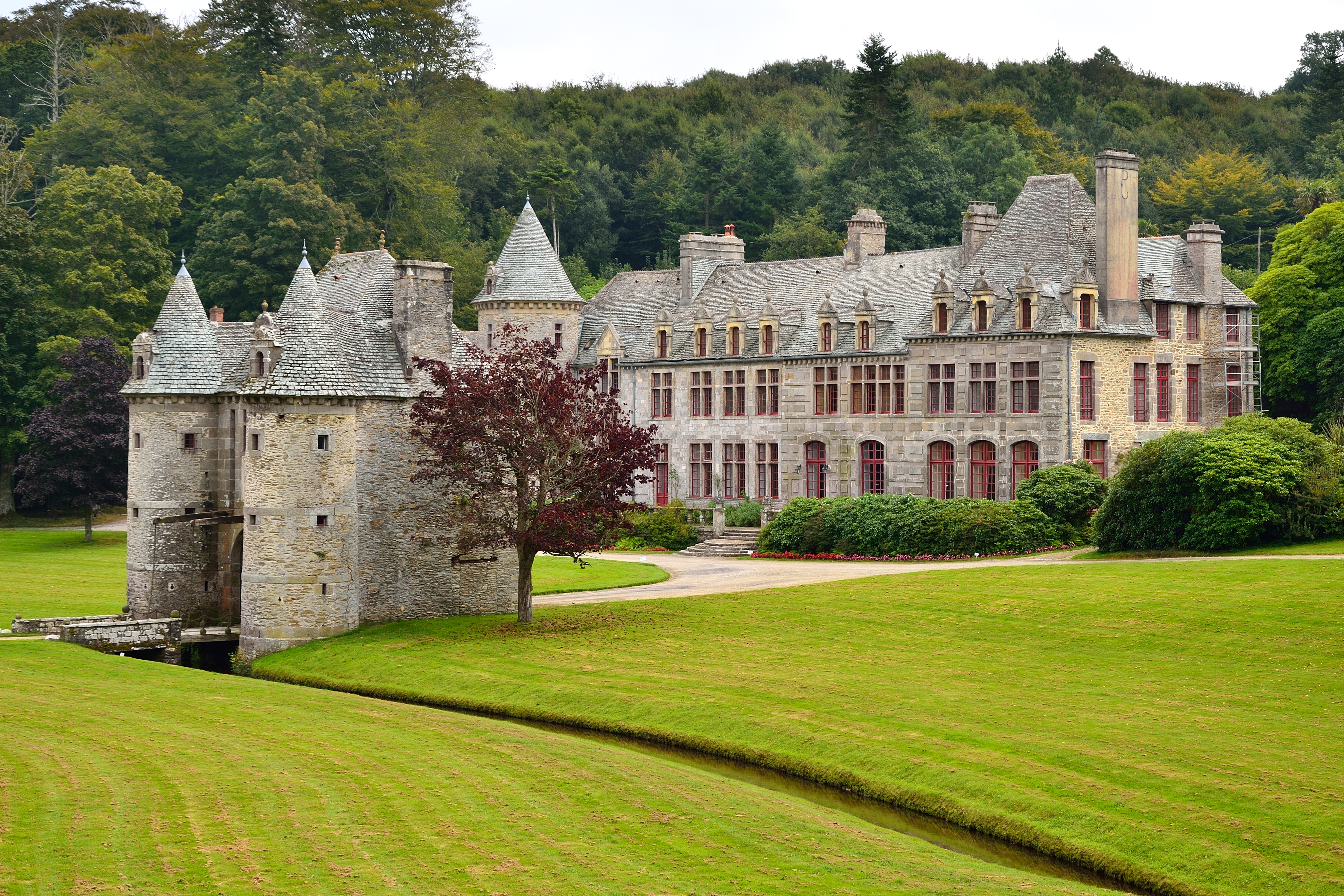 Chateau de Nacqueville, Urville-Nacqueville, Manche, Basse-Normandie, France .